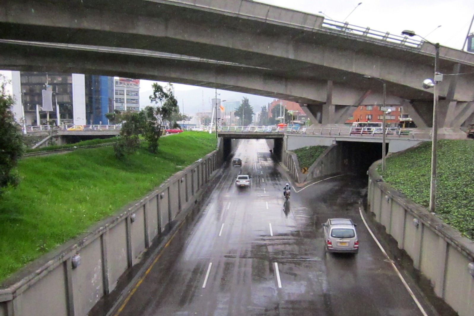 Bogotá, cruce de la avenida NQS con la calle 100. Extremo noroccidental de el barrio Chicó.